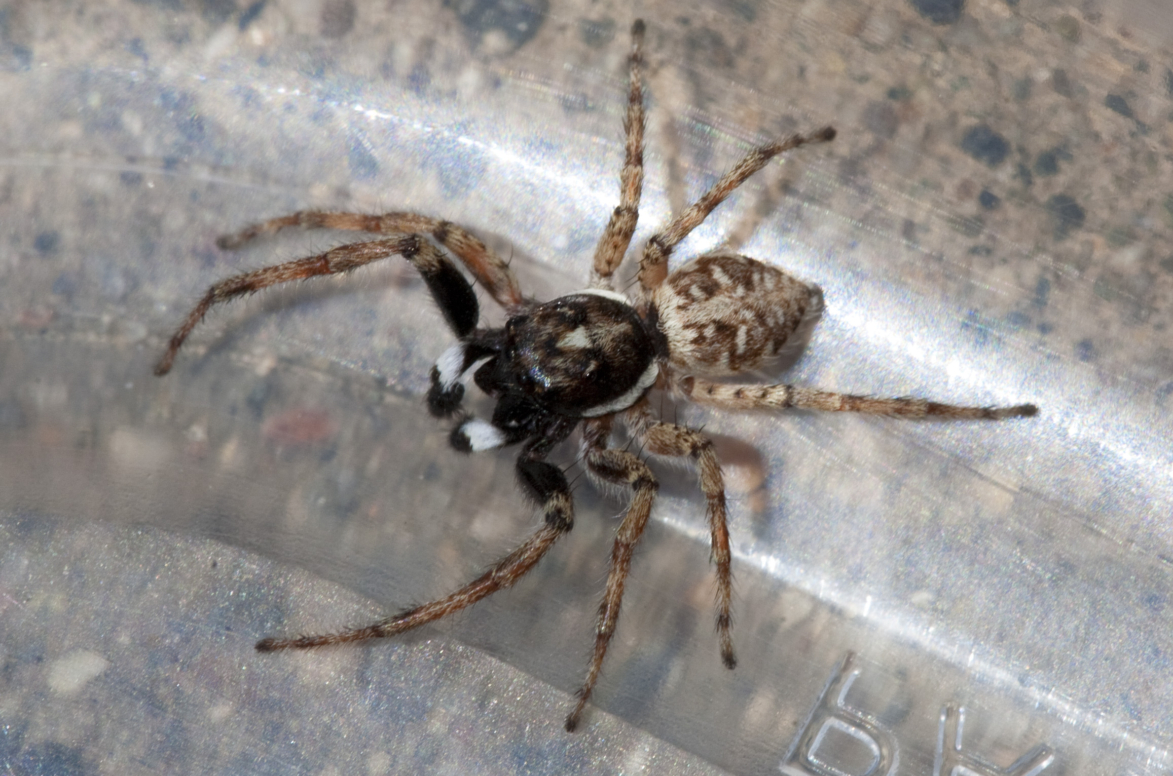 Adult male Menemerus semilimbatus jumping spider